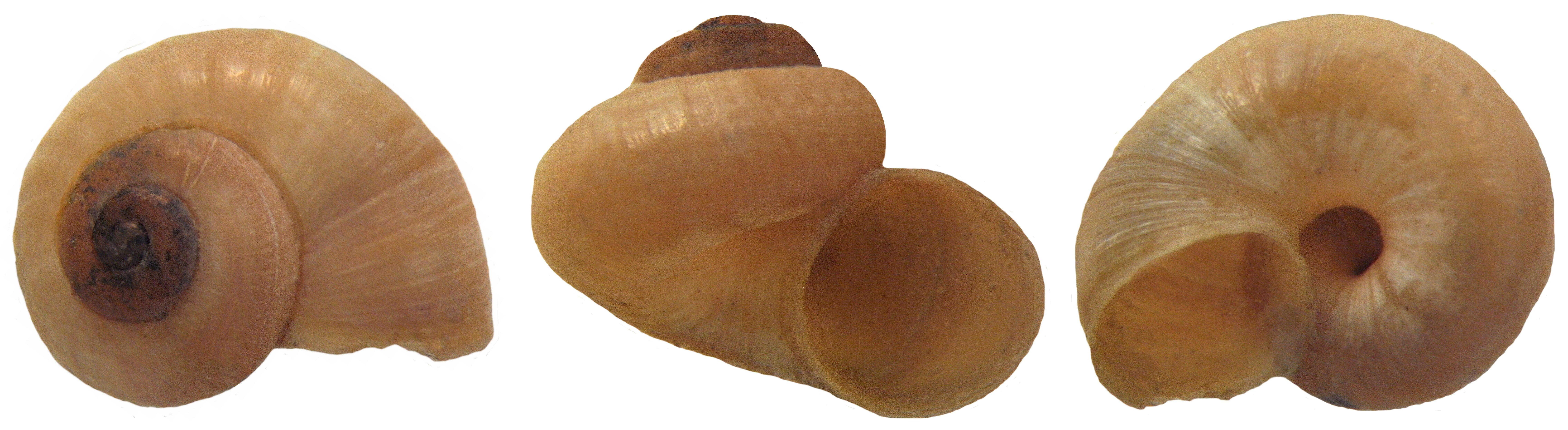 Familie: Valvatidae Groesse: 5,5 x 5,5 mm Verbreitung: Europa Ökologie: in stehenden und langsam fließenden Gewässern Fundort: Germania, Oberbayern, Bairawies leg.det. U.Schmidt, 1982 Photo: U.Schmidt, 2010